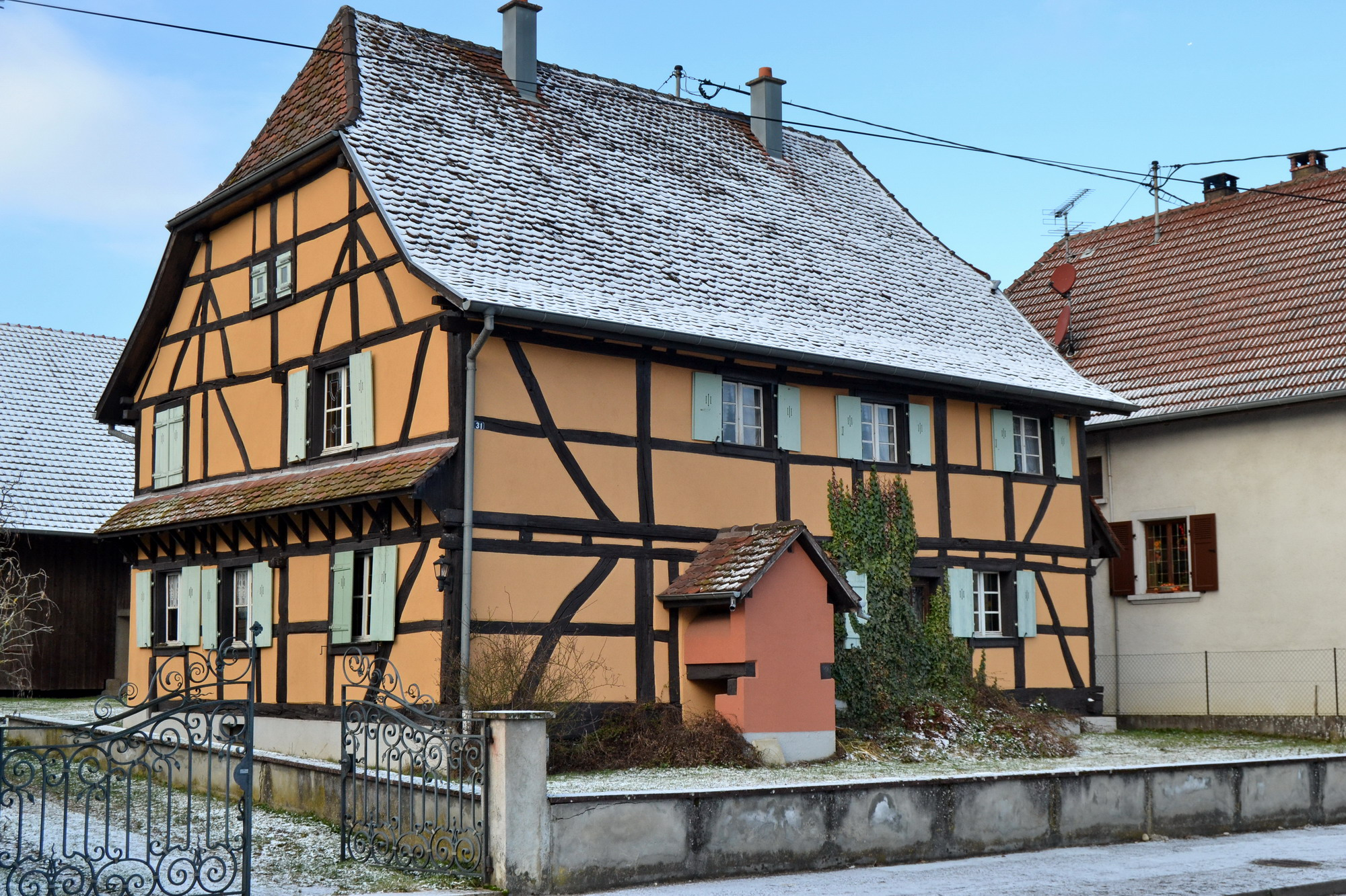 Balschwiller, Haut-Rhin, Alsace, France. Maison à colombages avec un four à pain apparent.